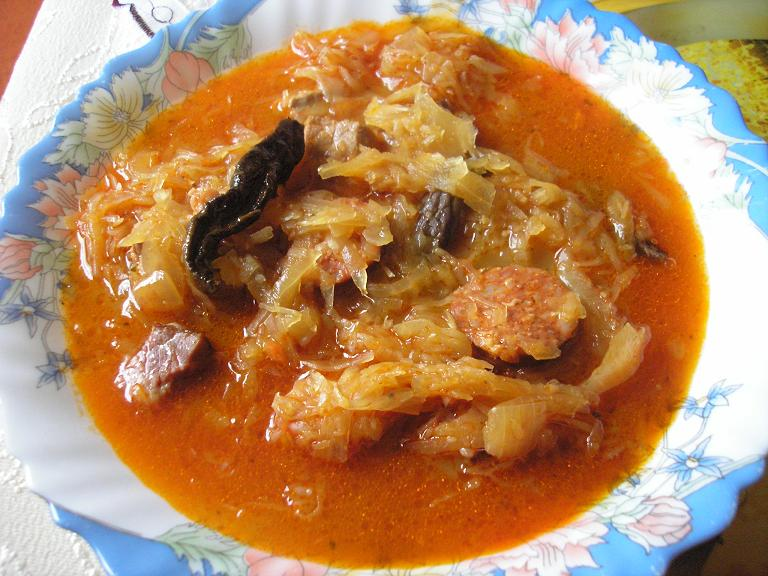 Silvestrovska kapustnica